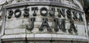 Postojnska Jama Sign